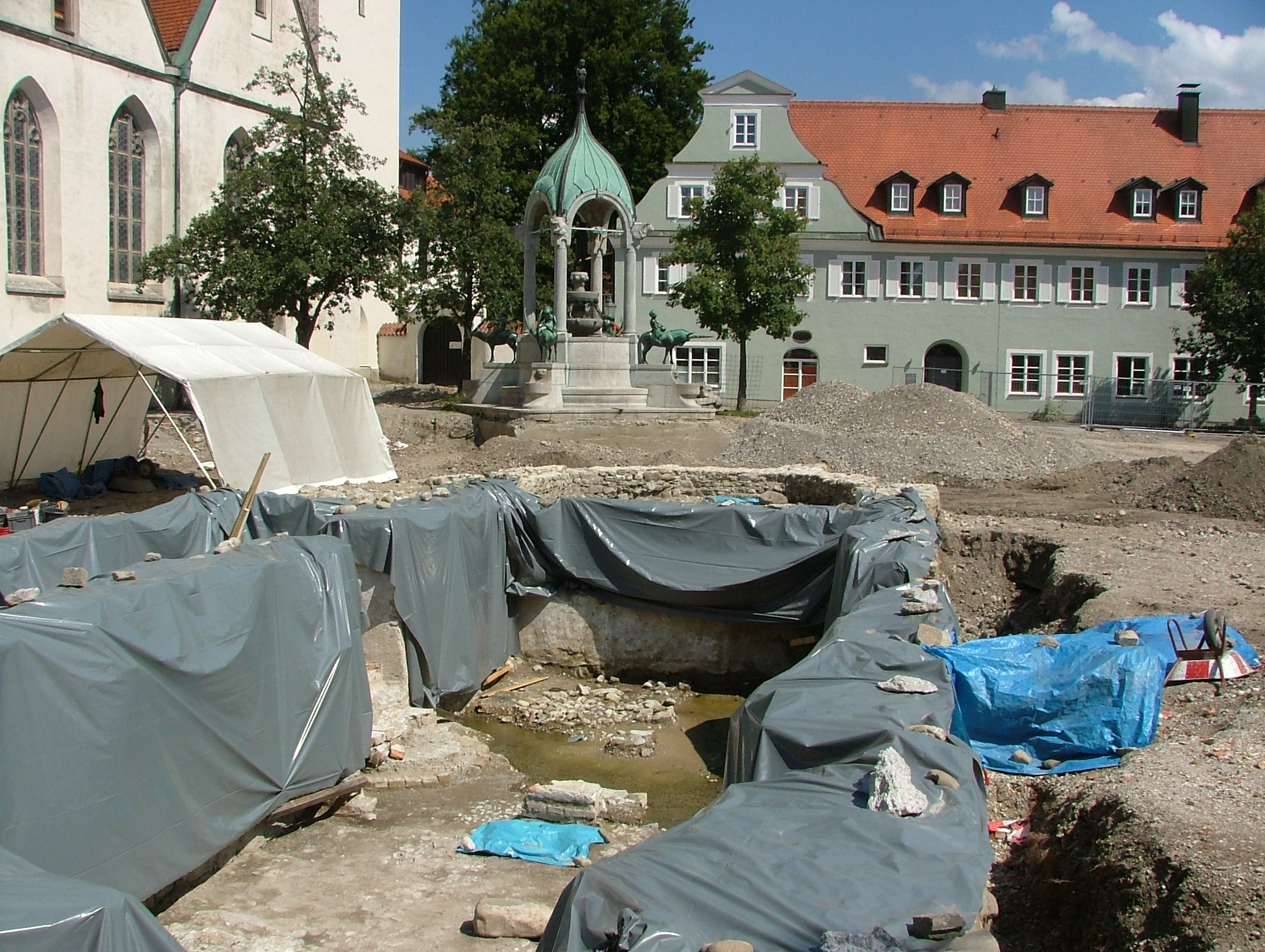 Erasmuskapelle Baustelle